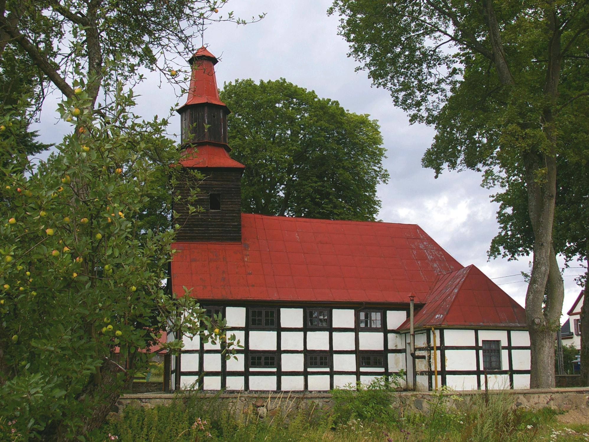 Żydowo, kościół